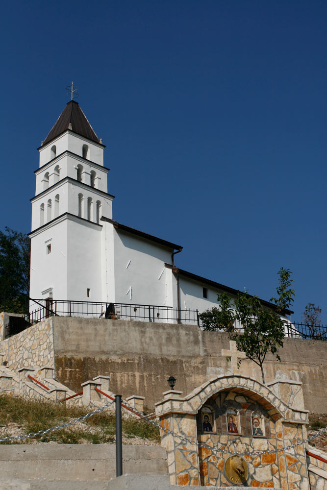 Црква Светог Архиђакона Стефана у Голубићу, саграђена 1462. године.